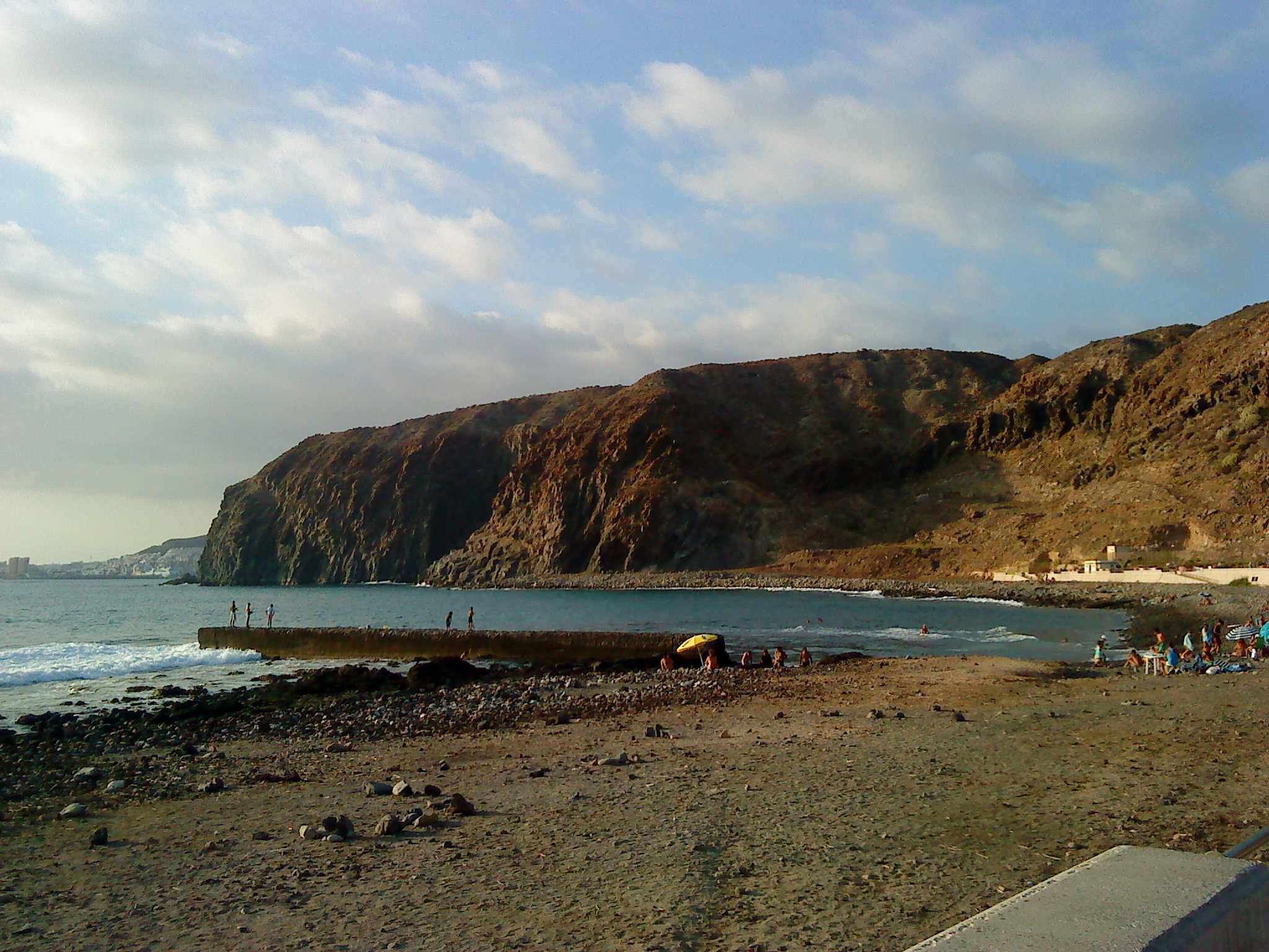 Playa de el Palmar, Arona